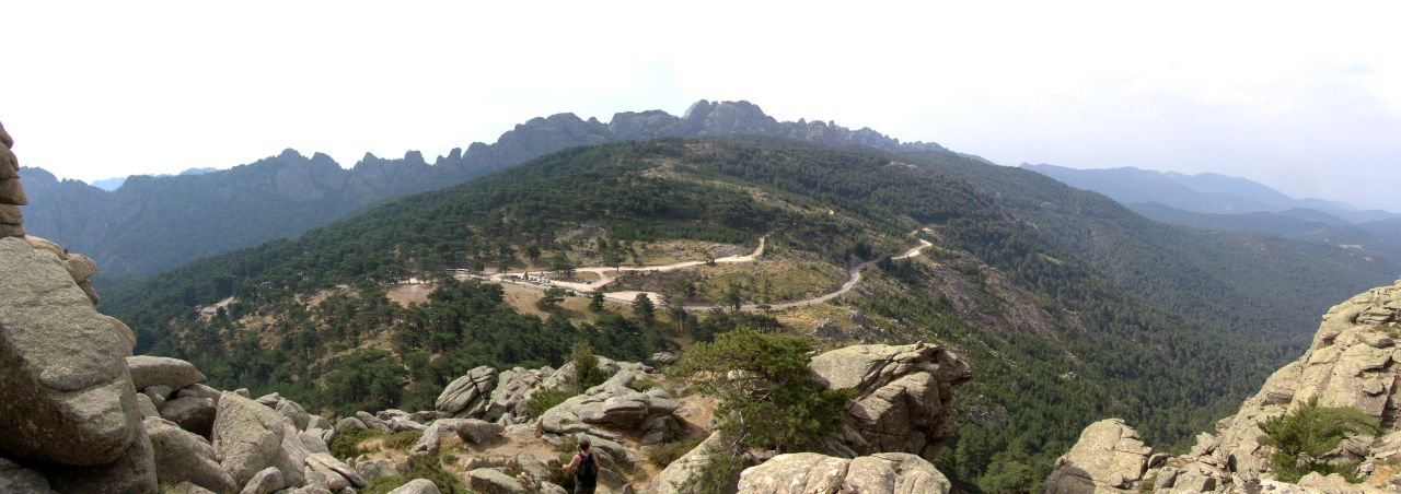 Corse (France) - Le col de Bavella. (A la date de l'import depuis Flickr par Marc ROUSSEL, l'auteur n'avait ni légendé ni commenté sa photo nommée comme d'autres "Col de Bavella".)